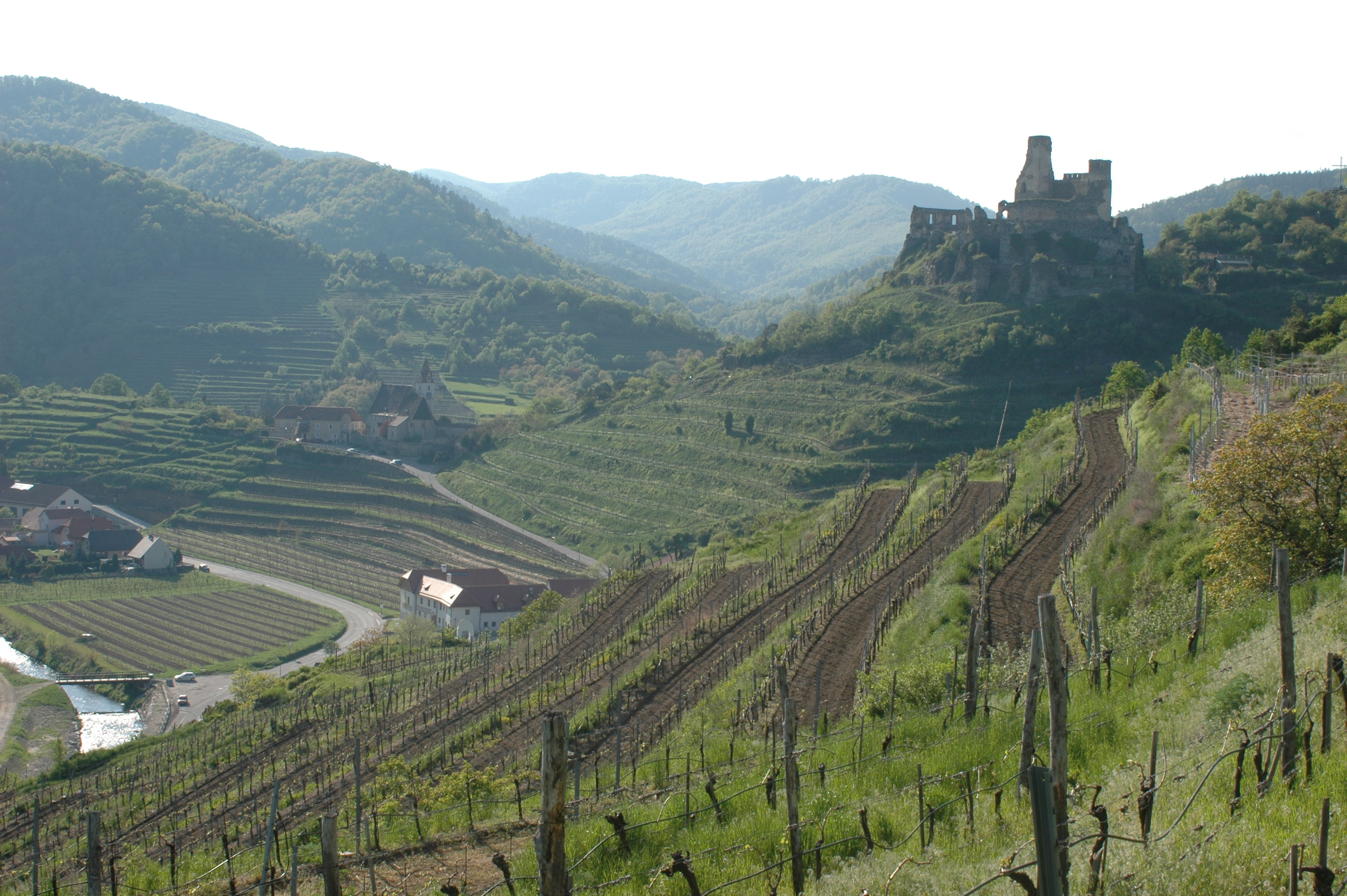 Blick auf die Pfarrkirche und Ruine Senftenberg im Kremstal